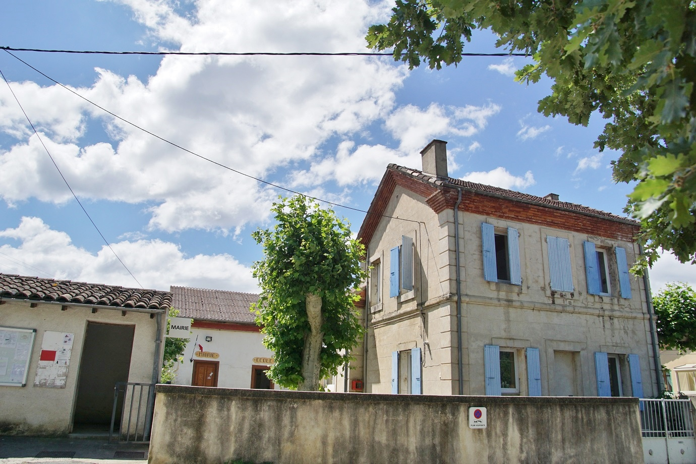 département de la Drôme